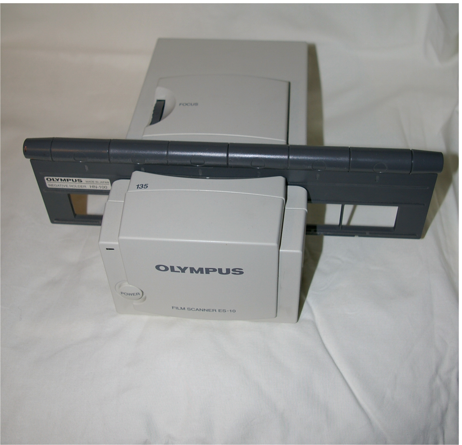 Diascanner (Olympus ES-10)